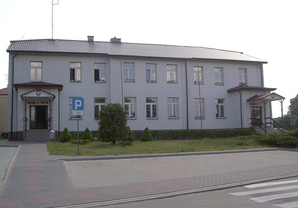 Księżpol, Poland • Urząd Gminy / Commune Council